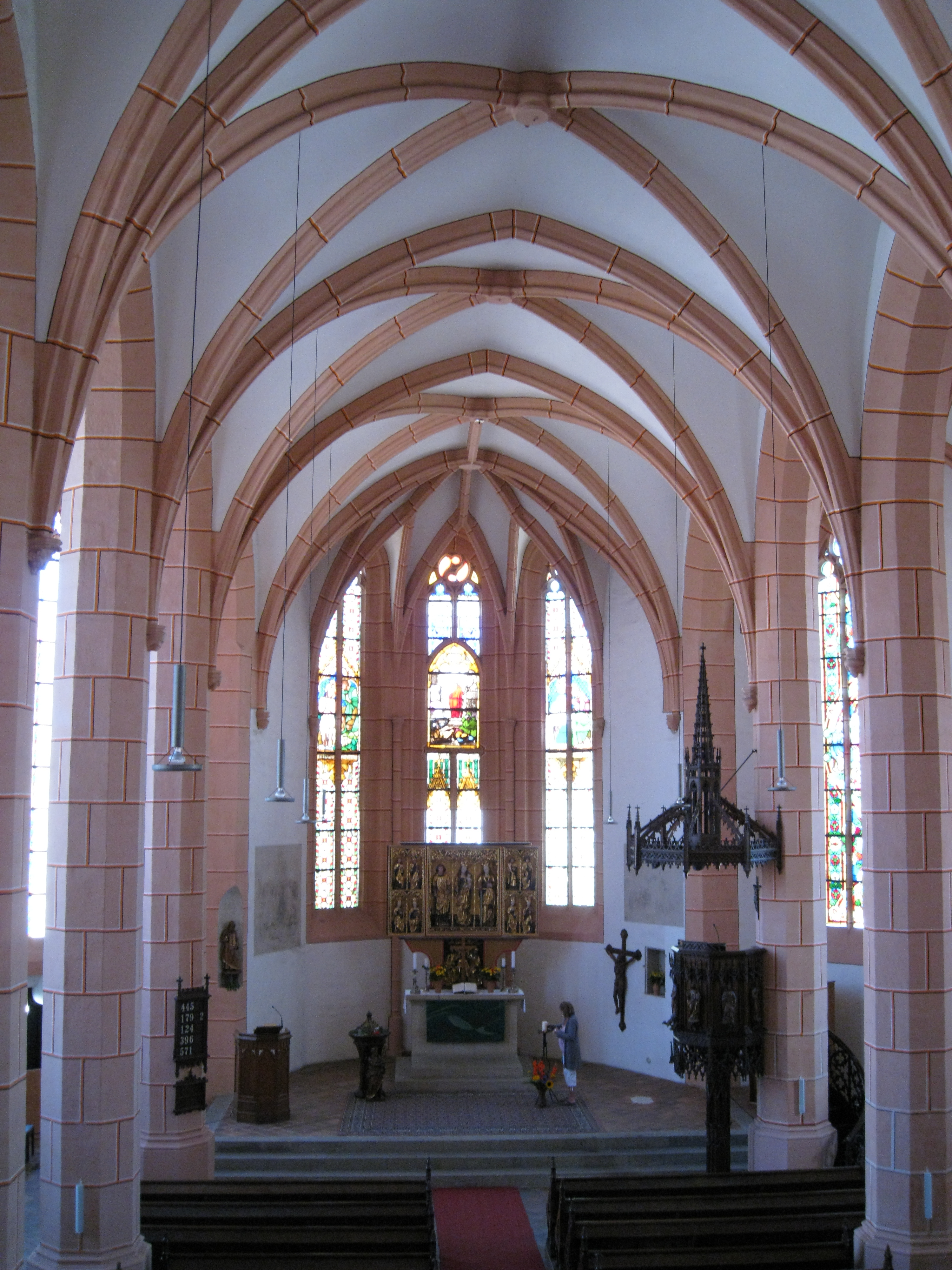 Chor der Bartholomäikirche in Altenburg